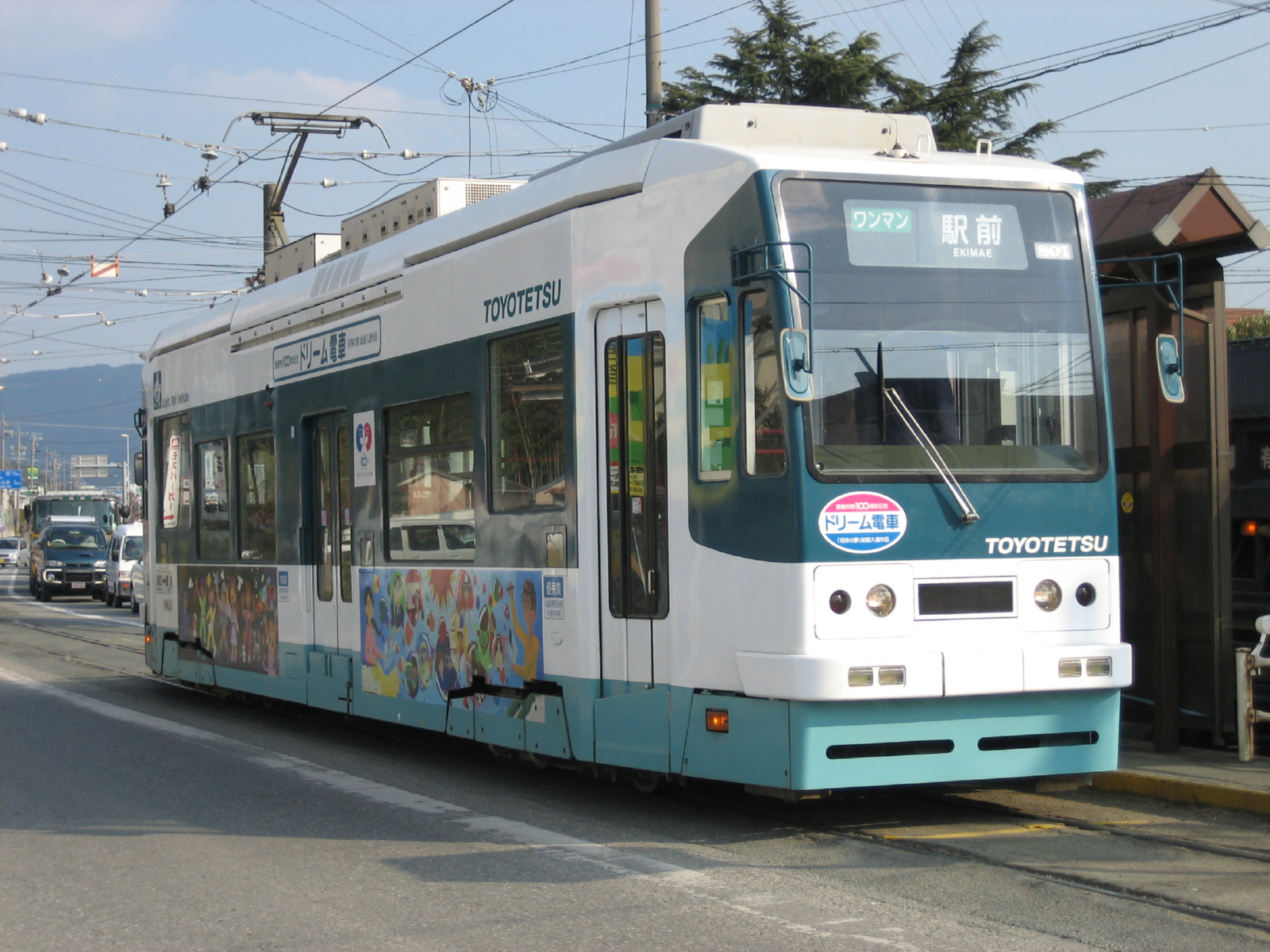 名古屋鉄道より移籍した豊橋鉄道モ800形電車 (801)。赤岩口停留場にて